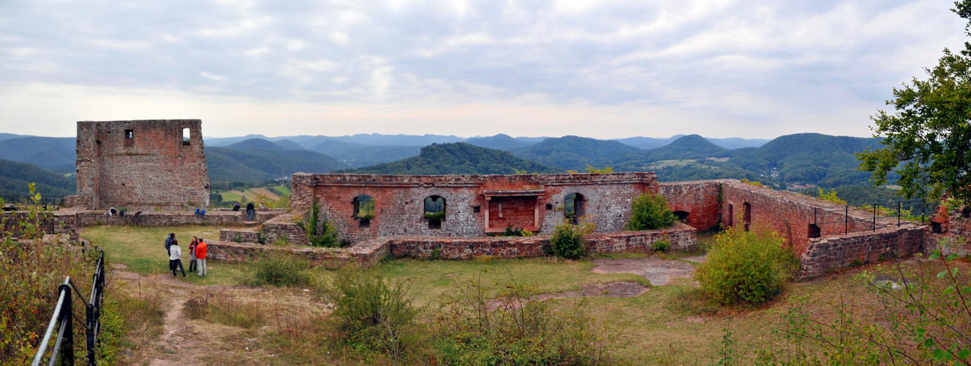 Panorama auf der Burg Lindelbrunn